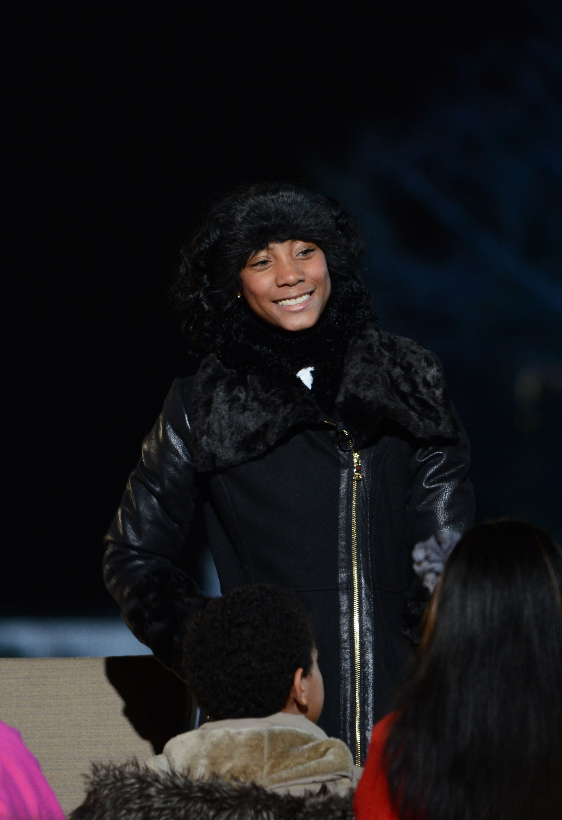 Mo'ne Davis